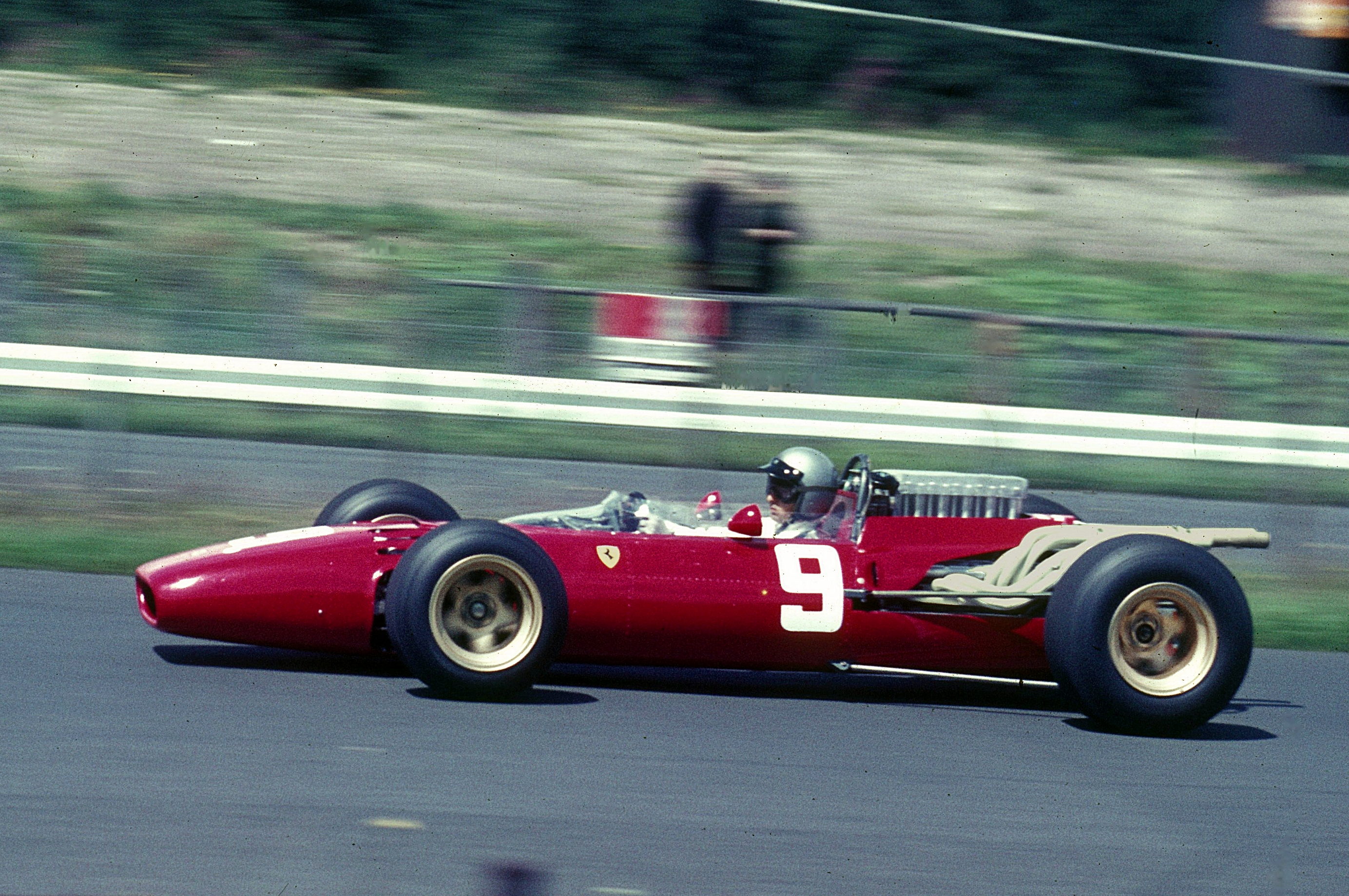 Bildbeschreibung: Lorenzo Bandini im Ferrari-12-Zylinder - Typ 312 Fotograf: Lothar Spurzem Datum: 1966 beim Training zum Großen Preis von Deutschland auf dem Nürburgring